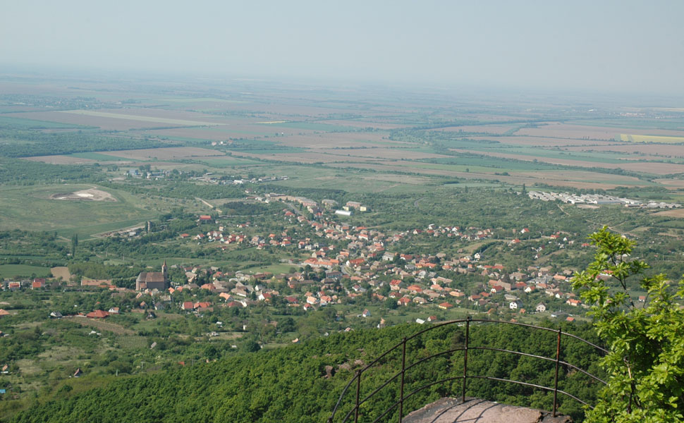 Kővágószőlős látképe a Zsongor-kőről